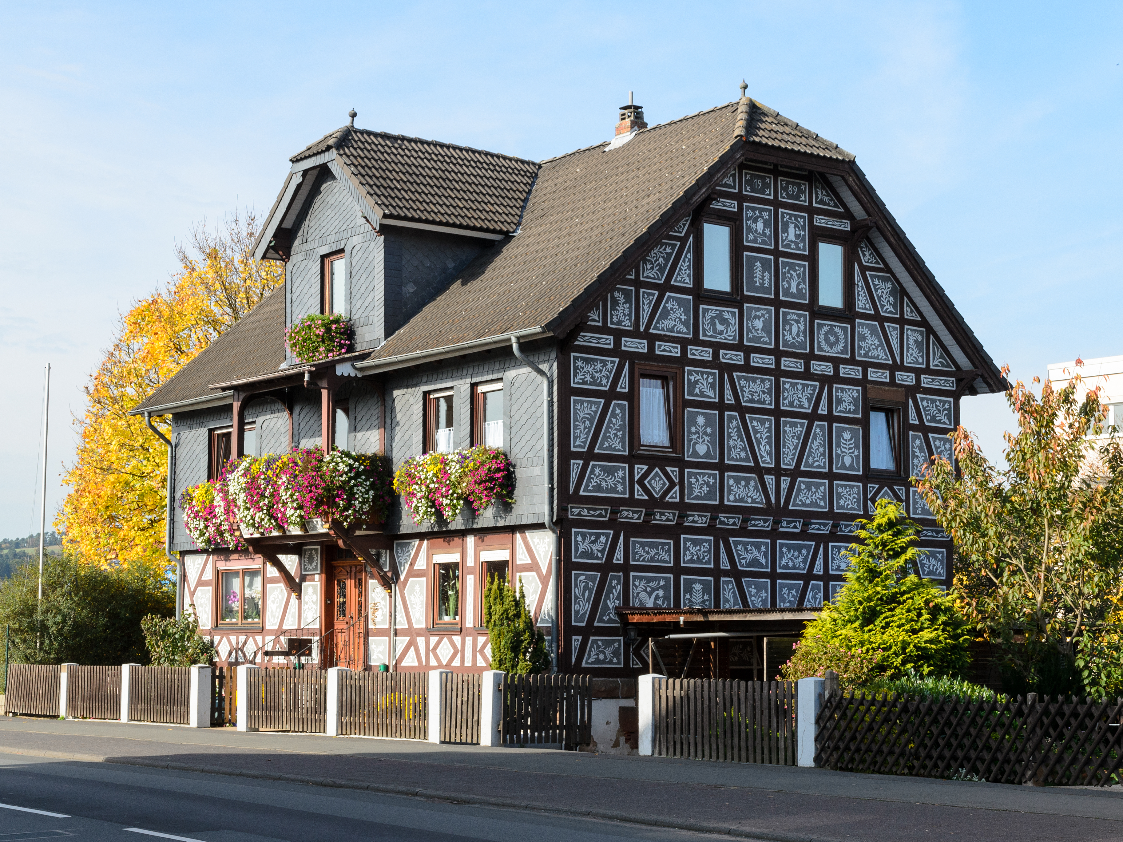 Wohnhaus Kasseler Str. 41 in Cölbe